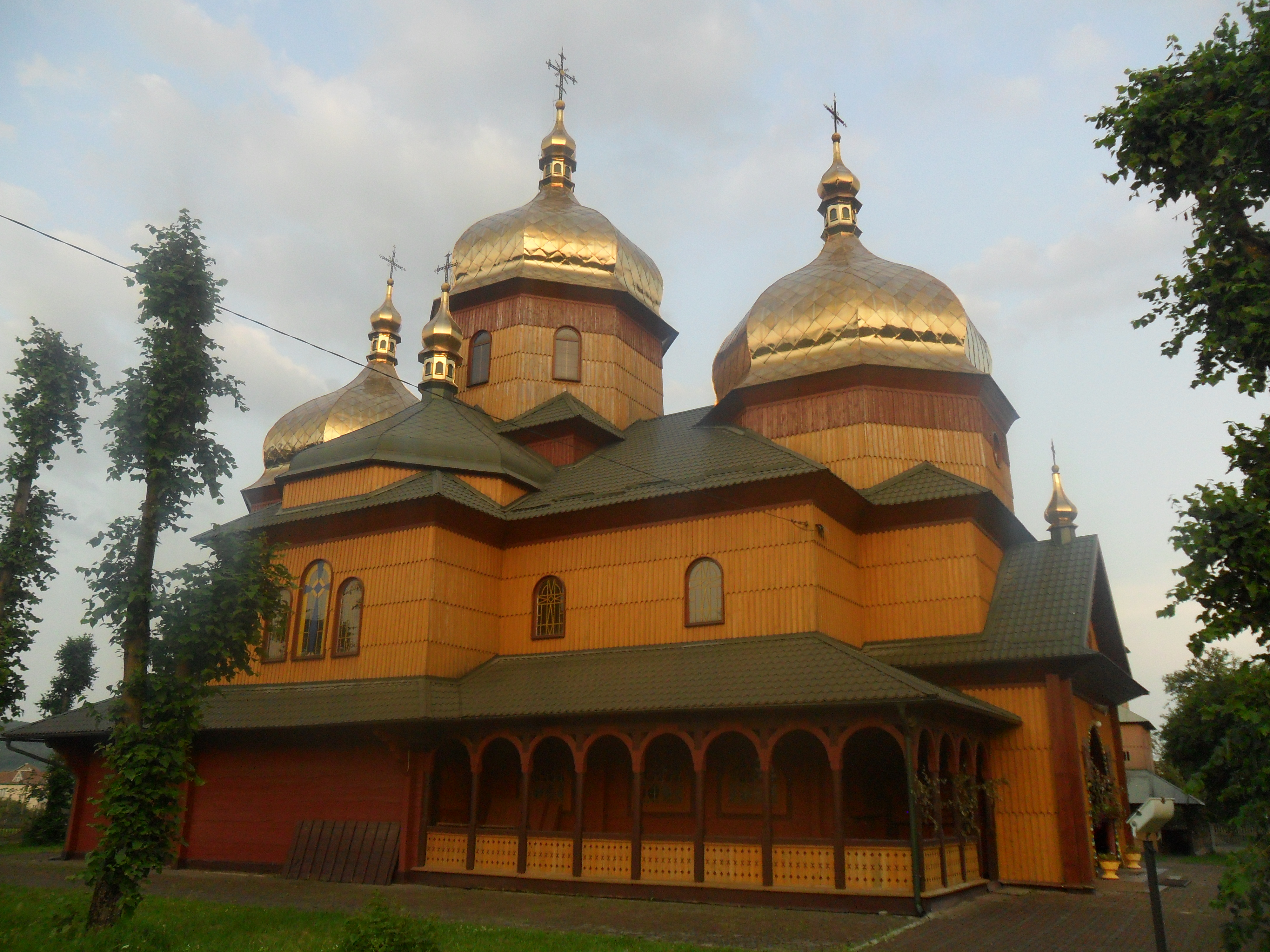 Церква Св. Миколая (дер.), с. Ямниця